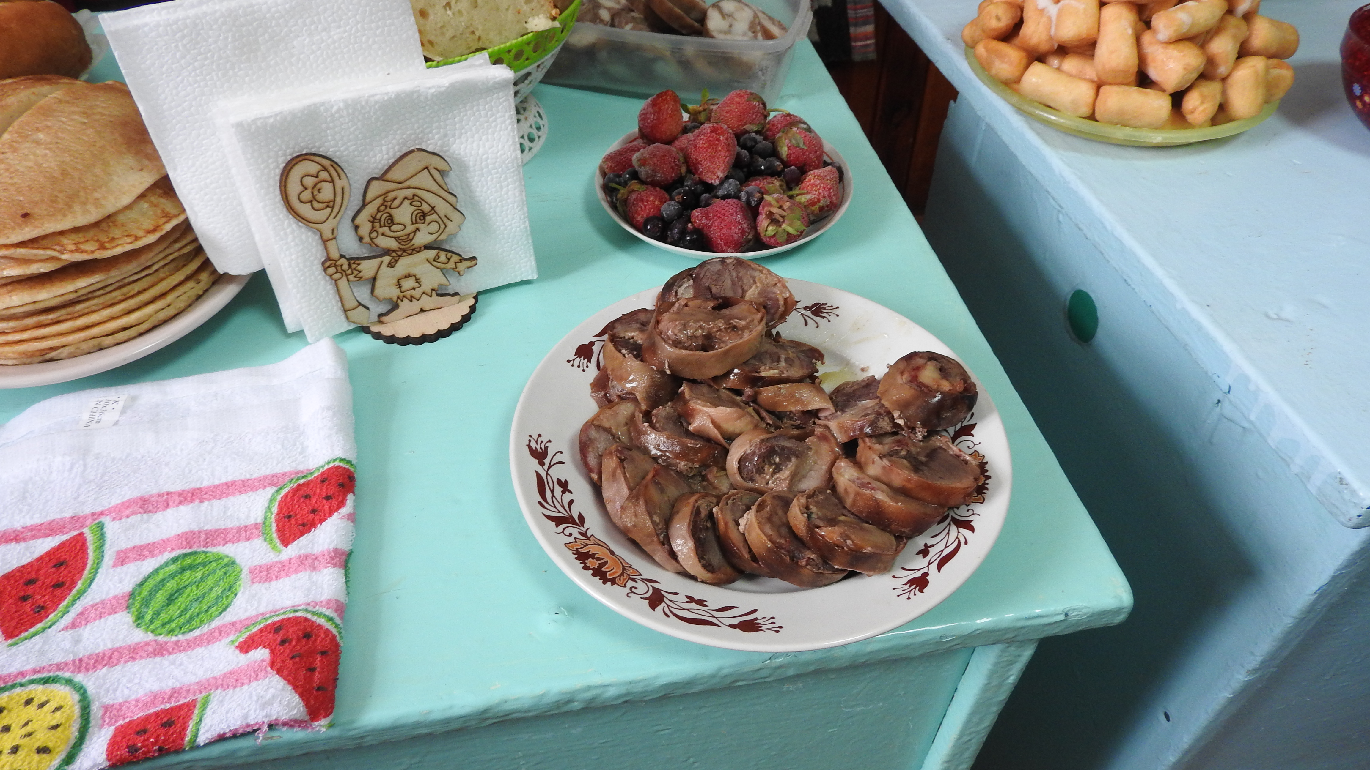 Башҡортса: Ауырғазы районы Үтәймулла ауылы. Шәжәрә байрамы, 15 февраль 2017 йыл.